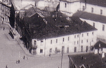 Беларуская (тарашкевіца): Менск (Miensk), Высокае Места (Vysokaje Miesta)